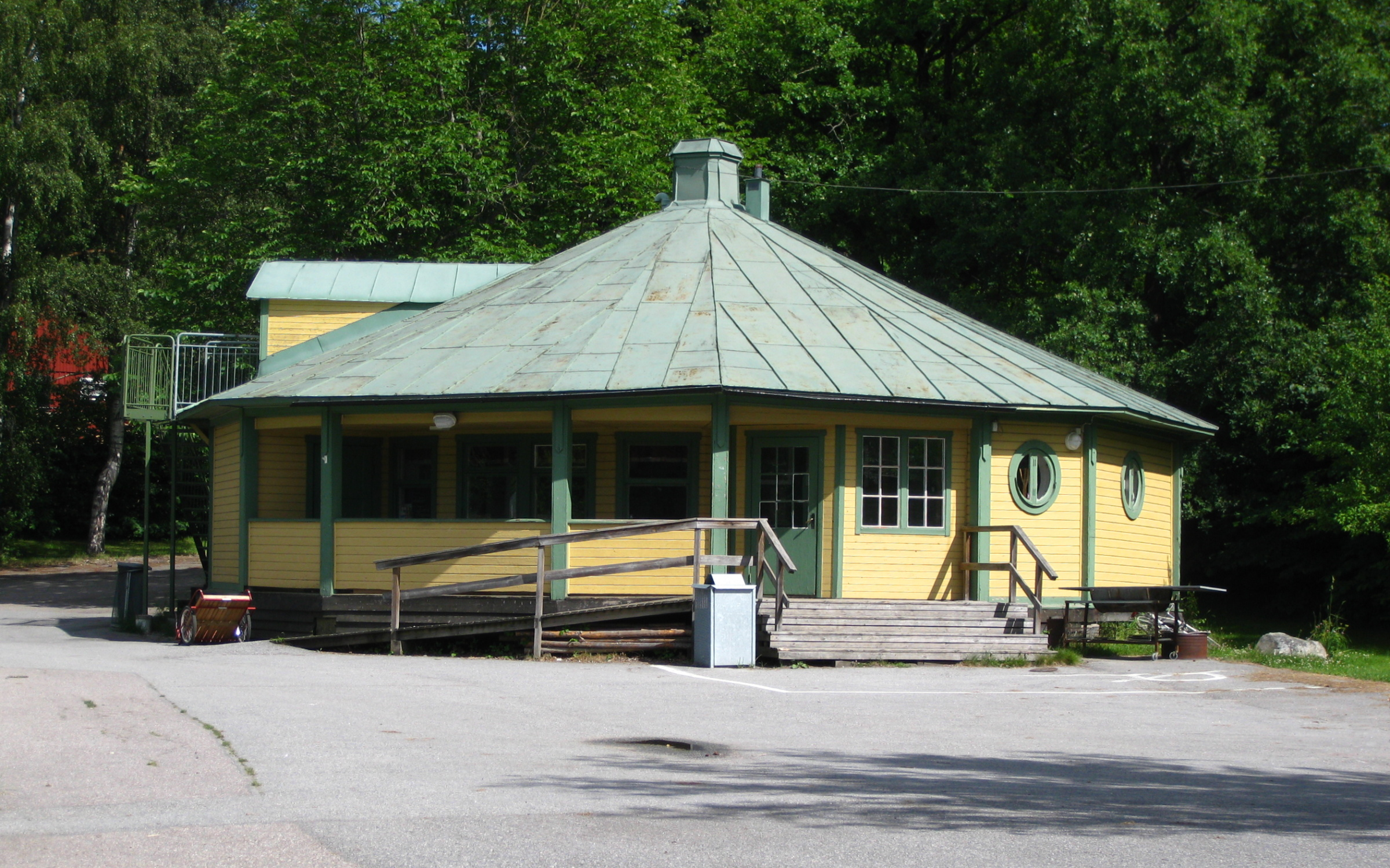 Klubbhuset Rotundan, Aspuddens IP, Aspudden, sydvästra Stockholm